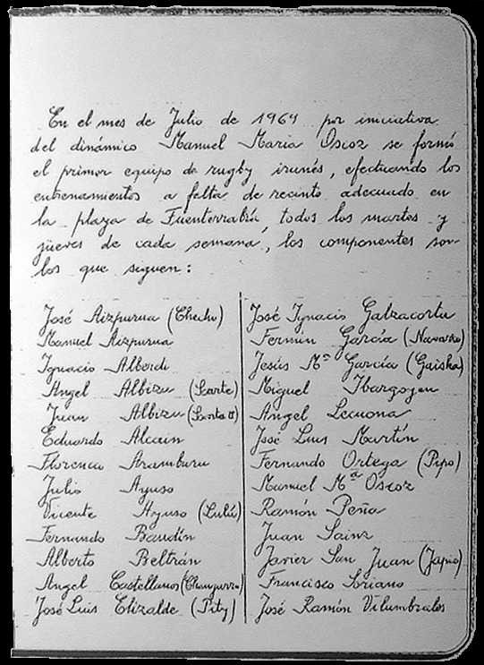 Escrito con el que se constituyó el primer equipo de Rugby irunés en 1969.